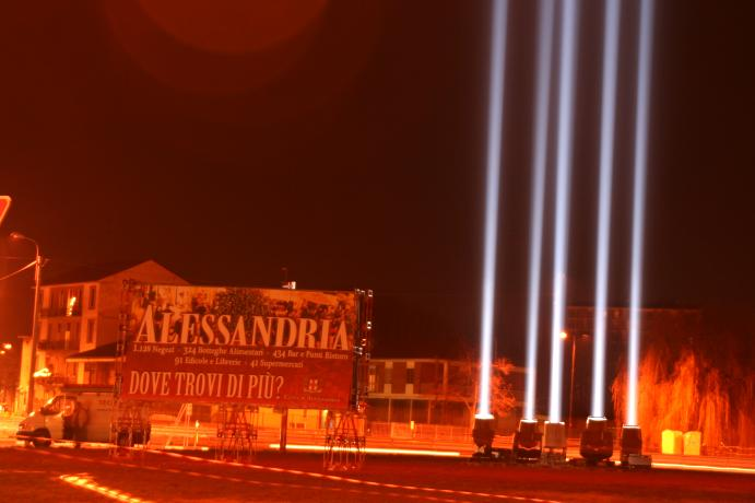 Foto di G. Gotta, 12 dicembre 2007. Il più cospicuo gruppo di fari che producono fasci di luce diretti al cielo sulla riva del fiume Tanaro, Alessandria, in occasione delle festività natalizie 2007. Tale azione produce la più grave forma di inquinamento luminoso secondo la definizione del fenomeno.